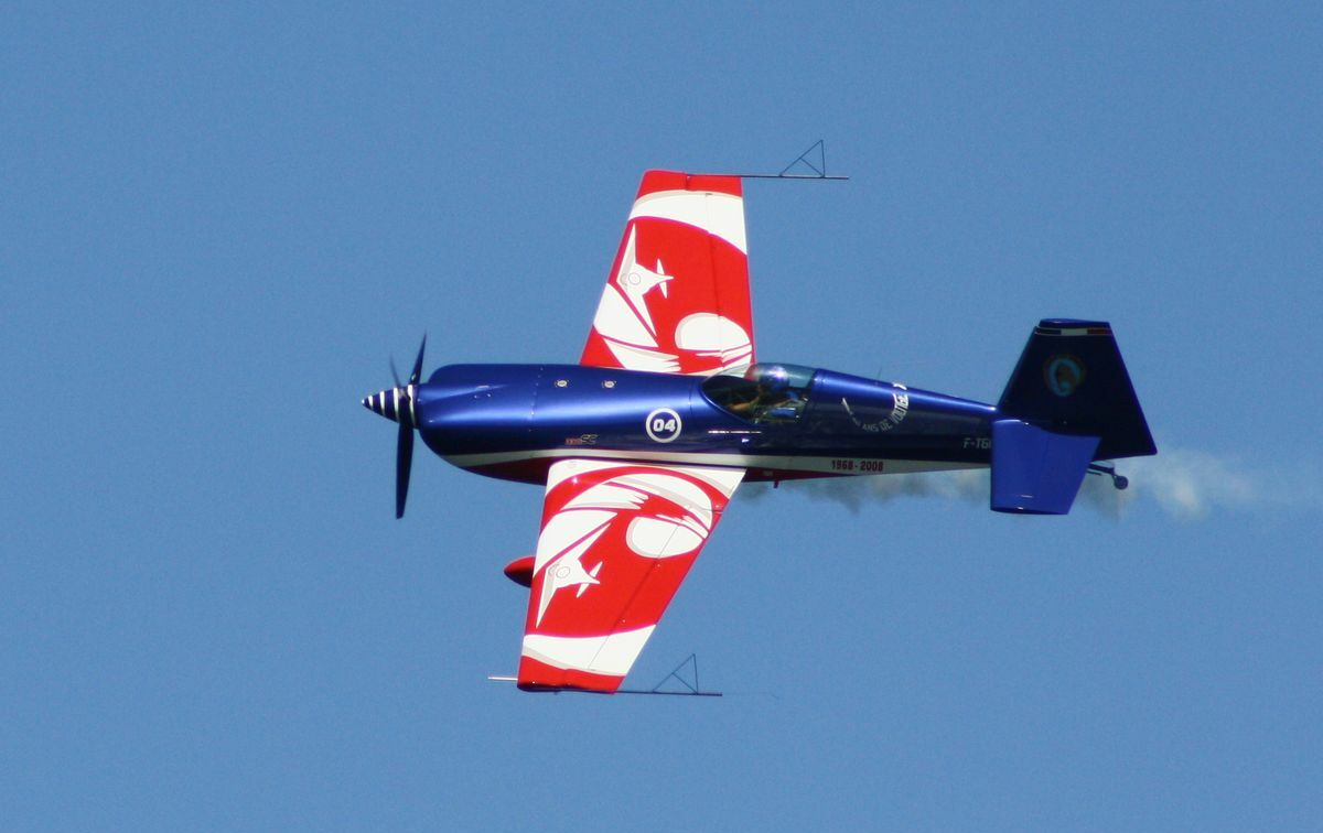 Walter Extra 300 SC, Vigo